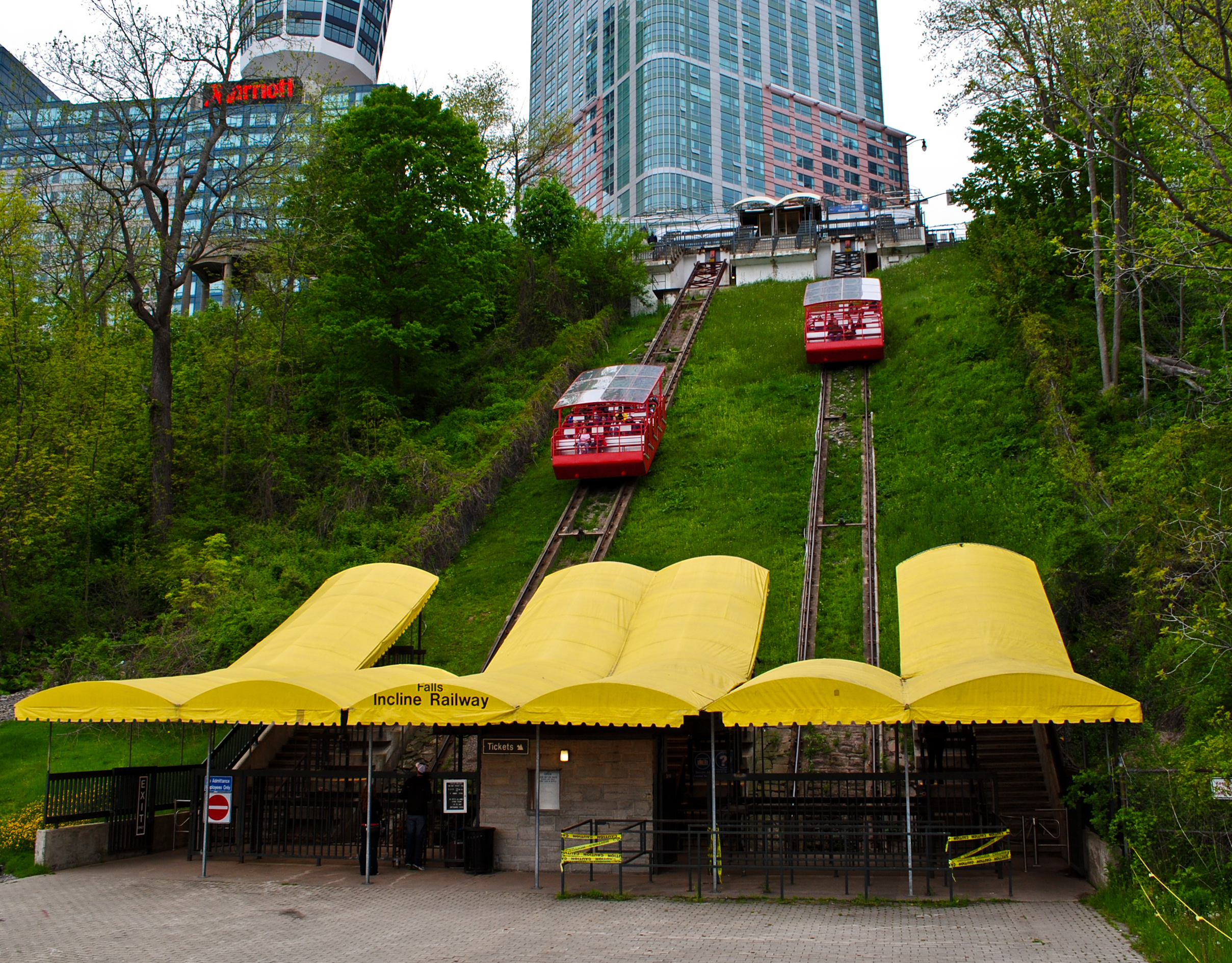 Niagara Parks Spring 2010-0240